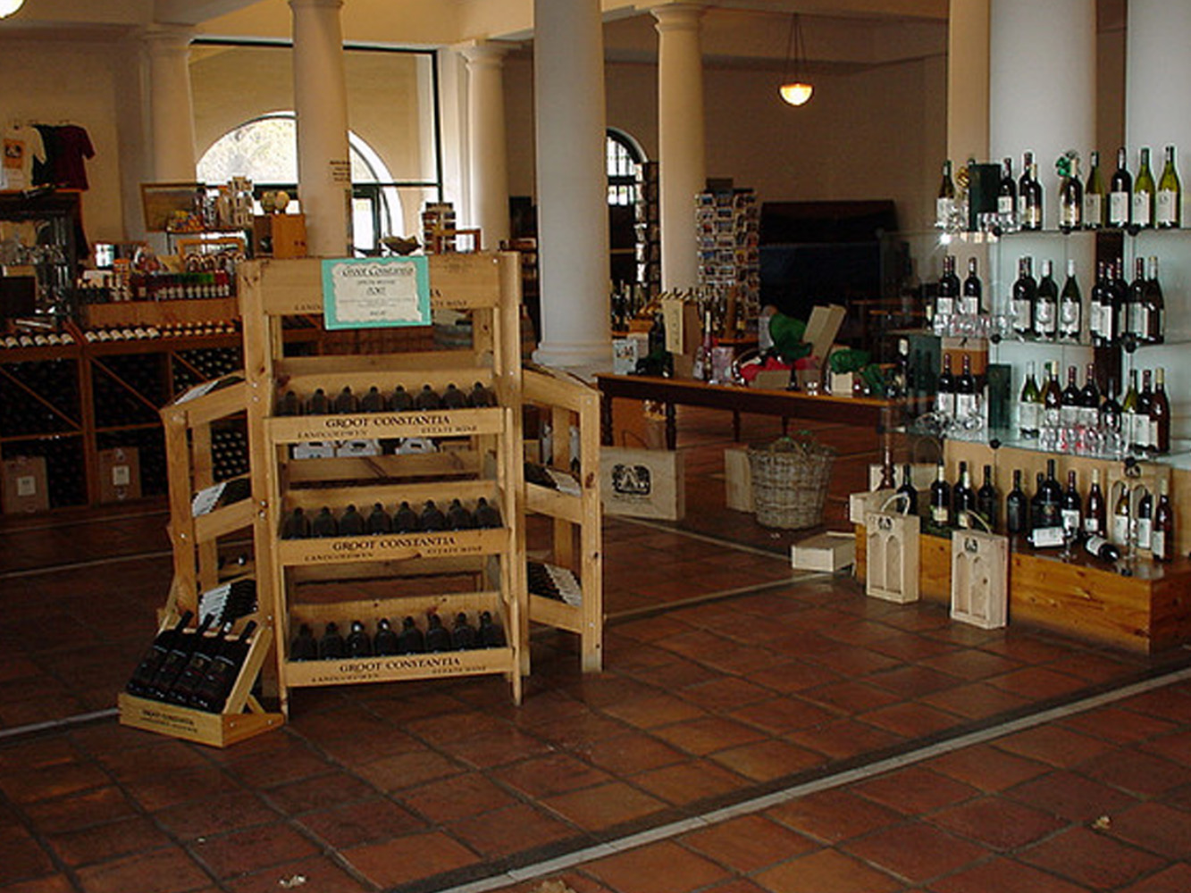 Caveau de déustation de Groot Constantia